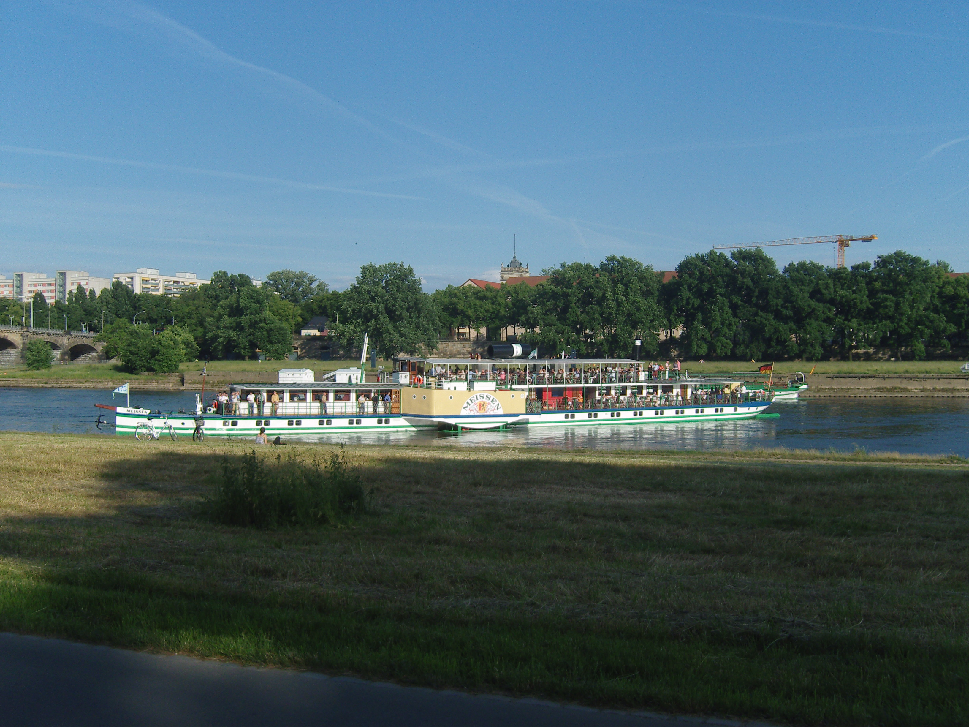 Meißen beim Wenden vor der Albertbrücke in Dresden